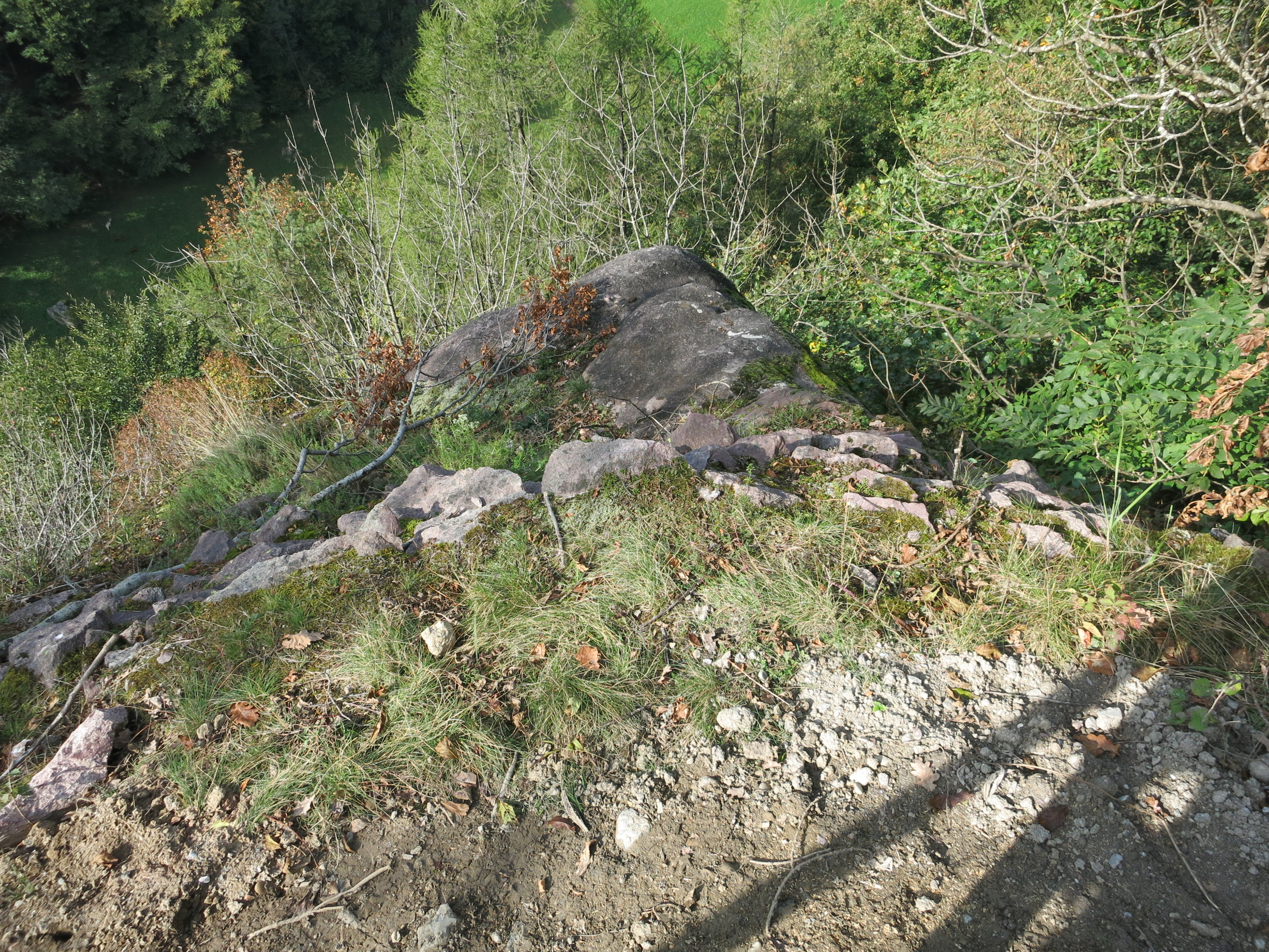 Reste römischer Wachtturm, Hügels Castels Westseite, Mels SG, Schweiz